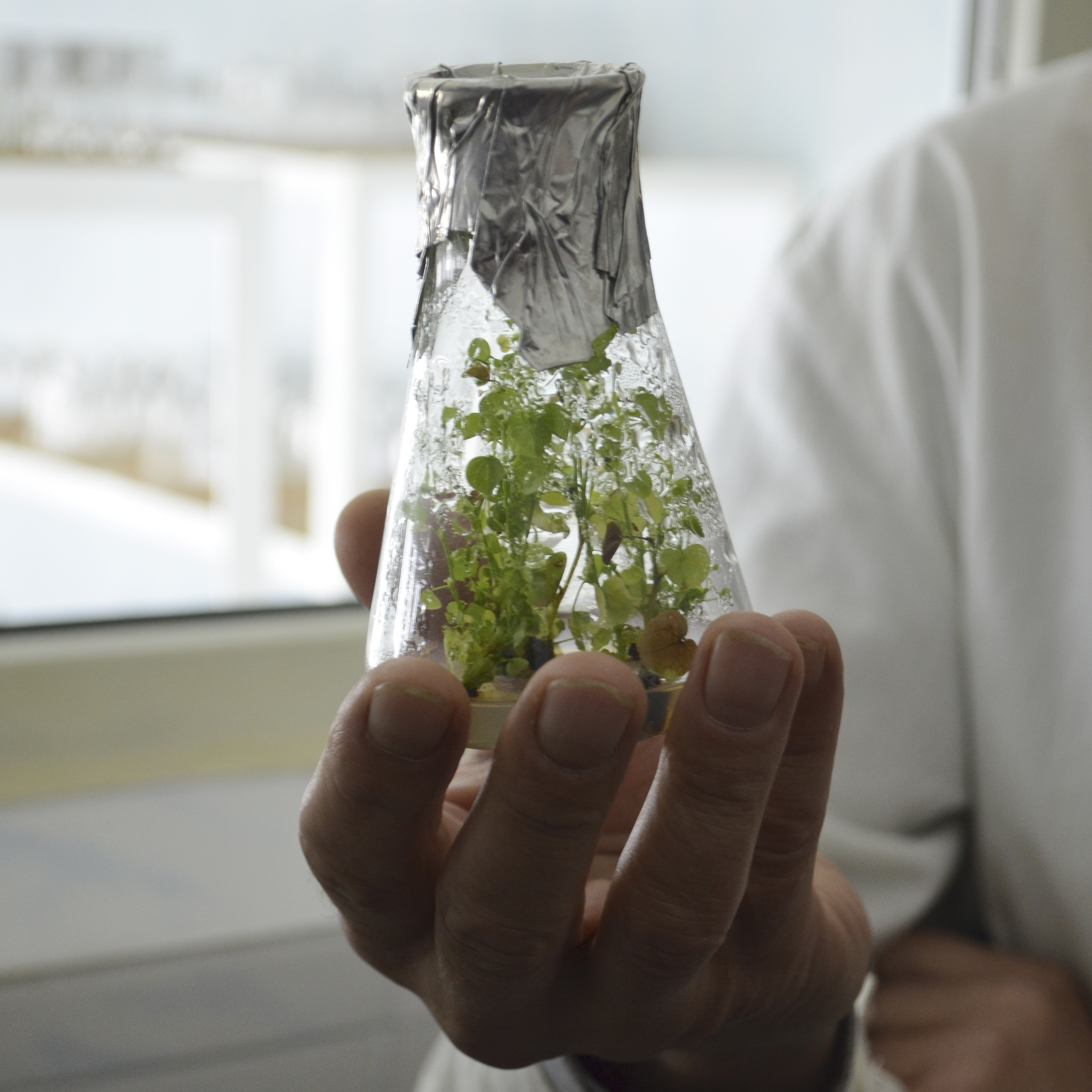 Колба із клонованою рослиною в лабораторії мікроклонального розмноження рослин